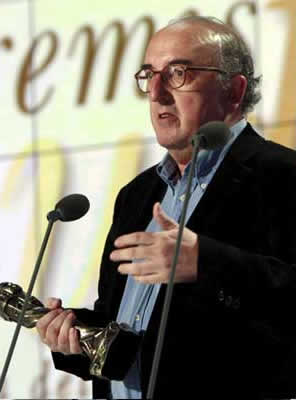 Jaume Roures, empresario de la comunicación y productor cinematográfico español; propietario de Mediapro.